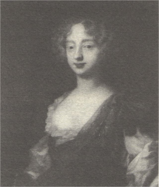 Carlotta Felicita di Brunswich-Lünenburg Moglie di Rinaldo d'Este, duca di Modena e Reggio col dominio della Garfagnana. Duchessa dal 1695 al 1710. Modena, raccolta Nannini.